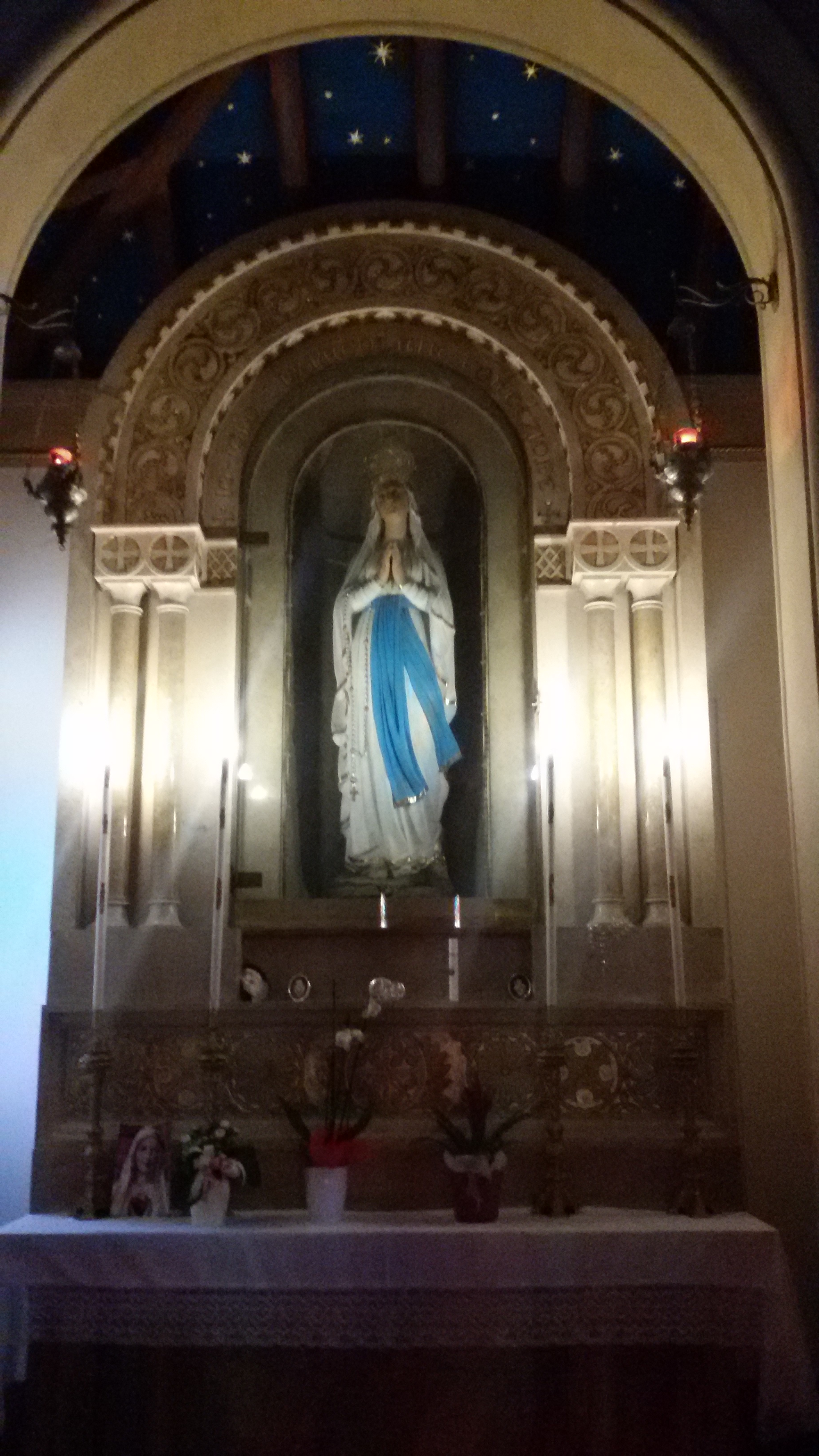 Chiesa di Santa Cristina Quinto di Treviso